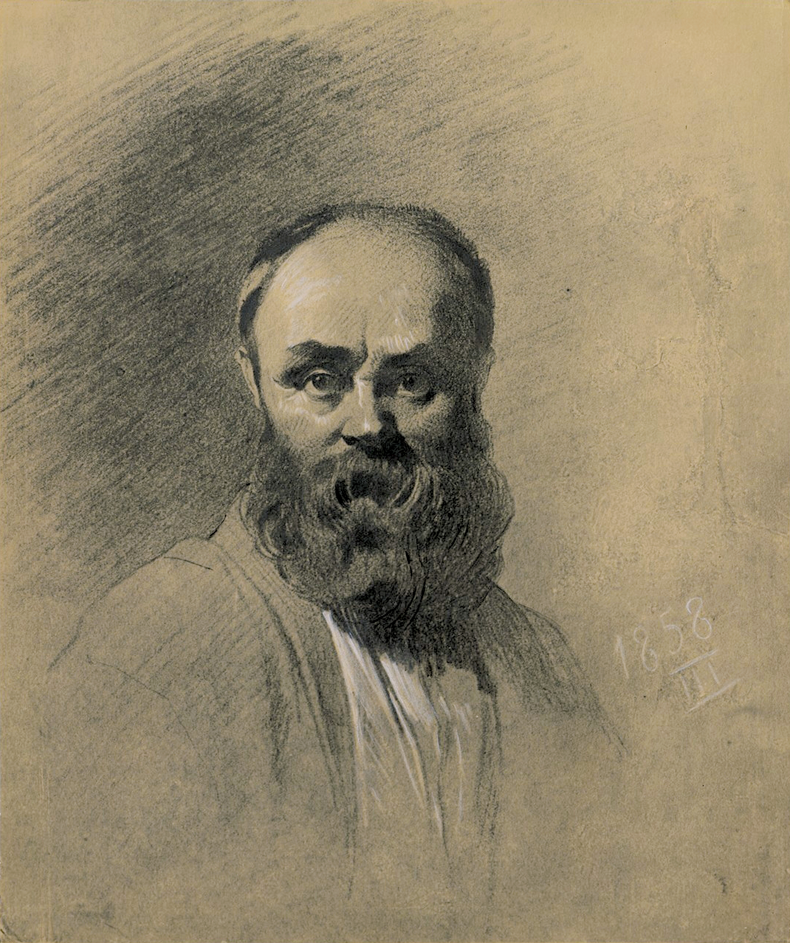 Автопортрет. Тонований папір, італійський та білий олівець (25,5 × 21,2) [Нижній Новгород]. [Н. п. 4.I] 1858. Справа внизу білим олівцем позначена авторська дата і монограма: 1858 / III.